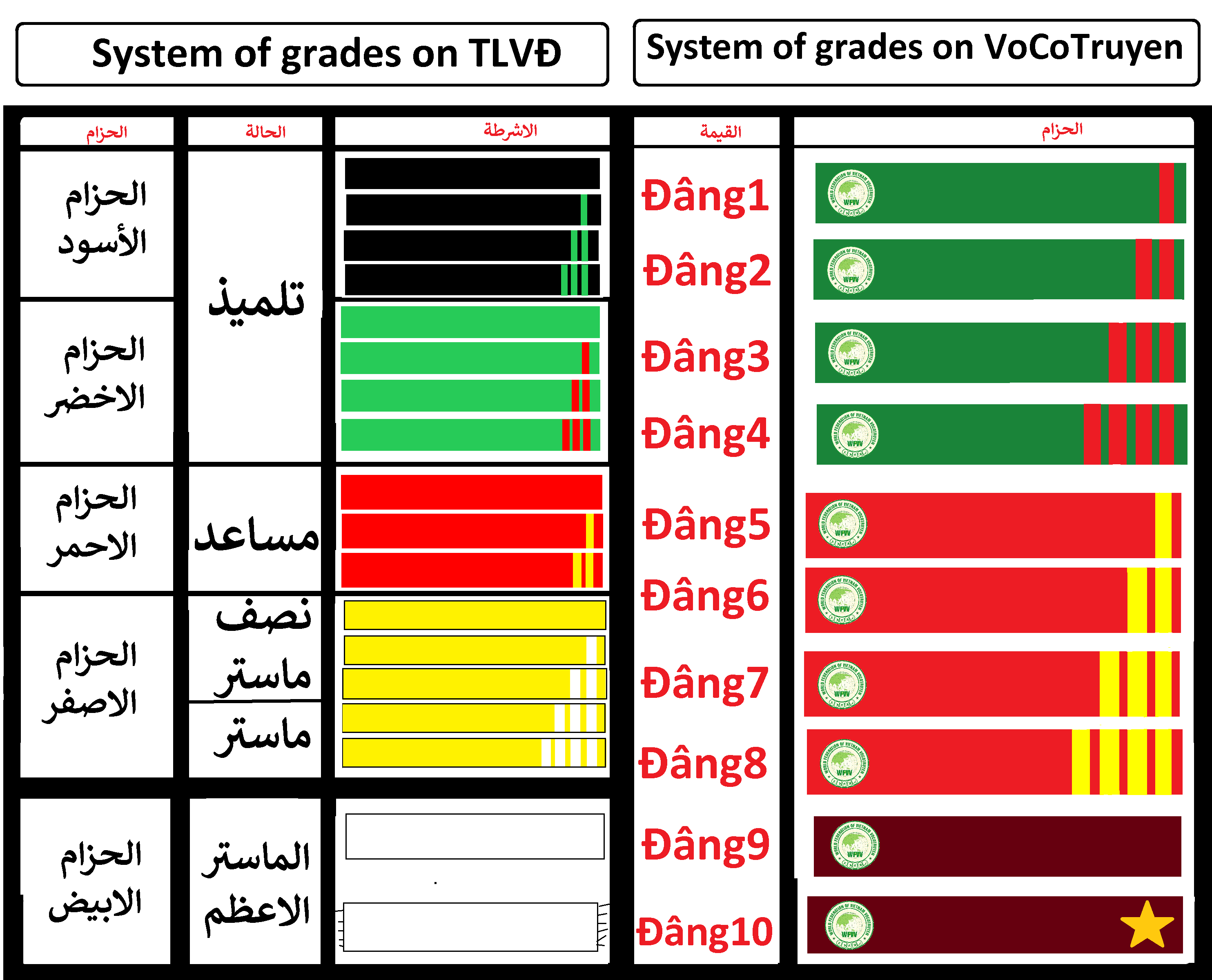 سناتر